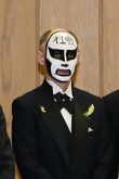 日本のイラストレーターの倉科岳文（再犯防止推進のための国・地方・民間会合にて）